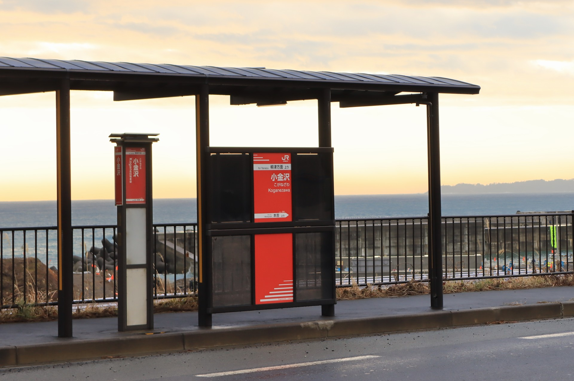 宮城県気仙沼市に所在する、JR東日本・気仙沼線BRTの小金沢駅。国道45号上に設置。